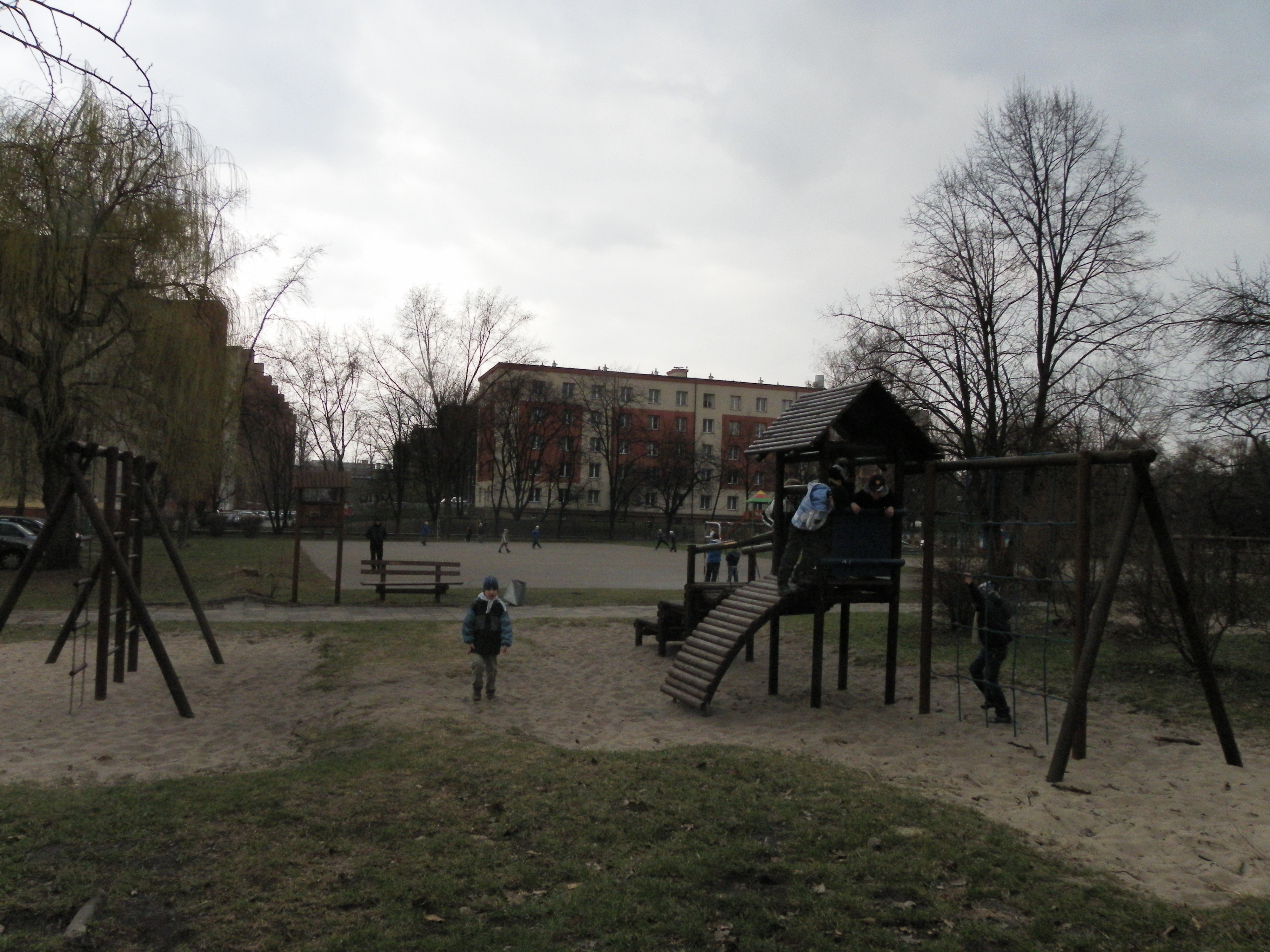 Plac zabaw i boisko przy Zespole Szkół Ogólnokształcących Integracyjnych nr 1 im. Janusza Korczaka w Krakowie przy al. Kijowskiej 3.